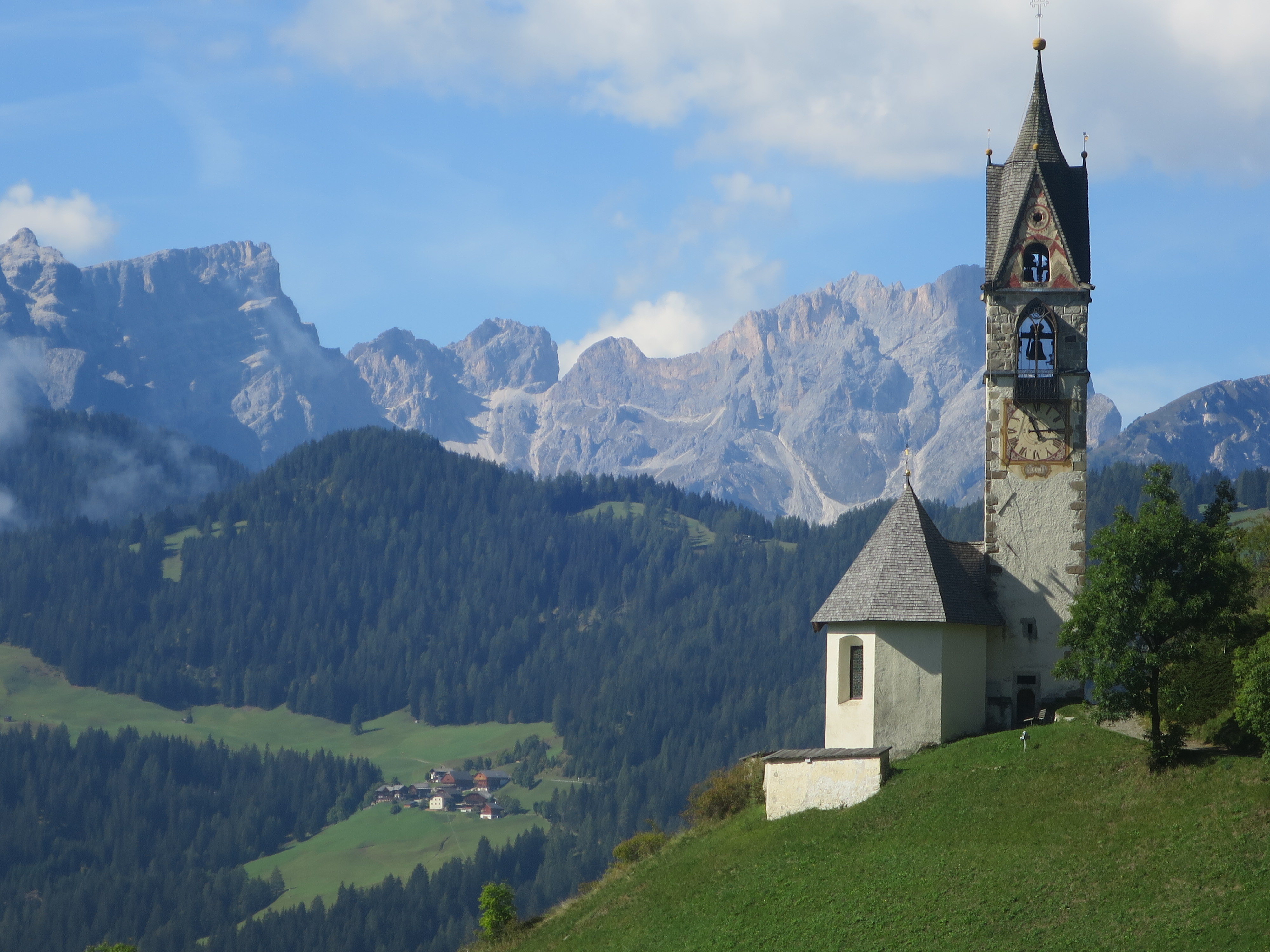 St. Barbara oberhalb von Wengen